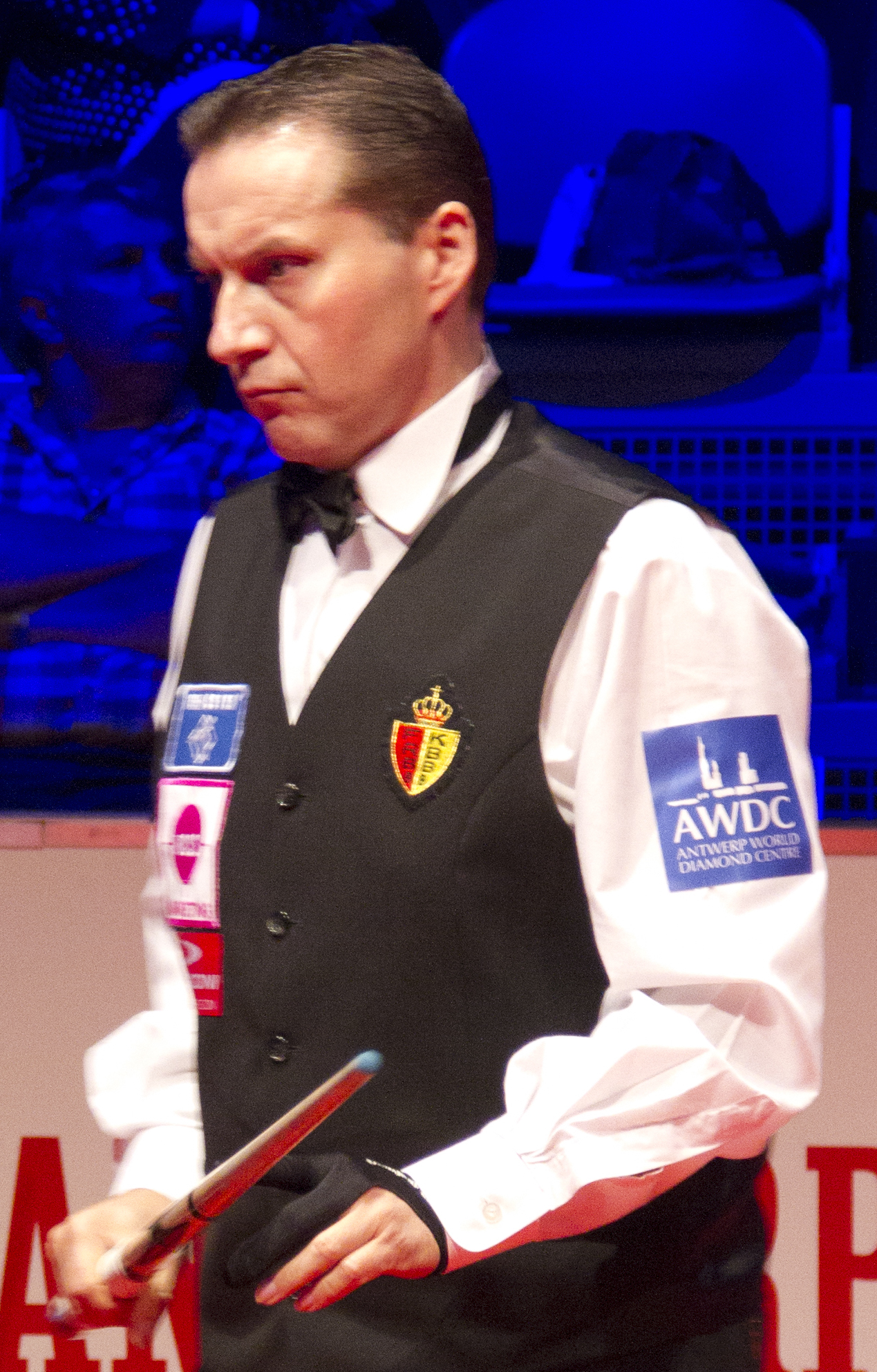 Portrait-Ausschnitt von Originaldatei (s.u.).